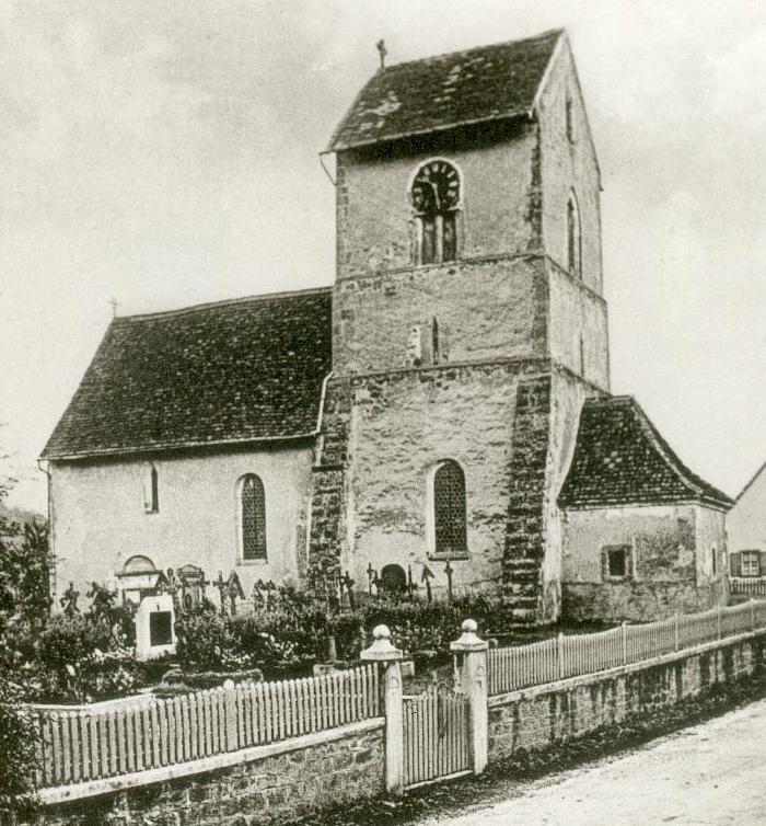 Kirche von Wittelbach um 1930